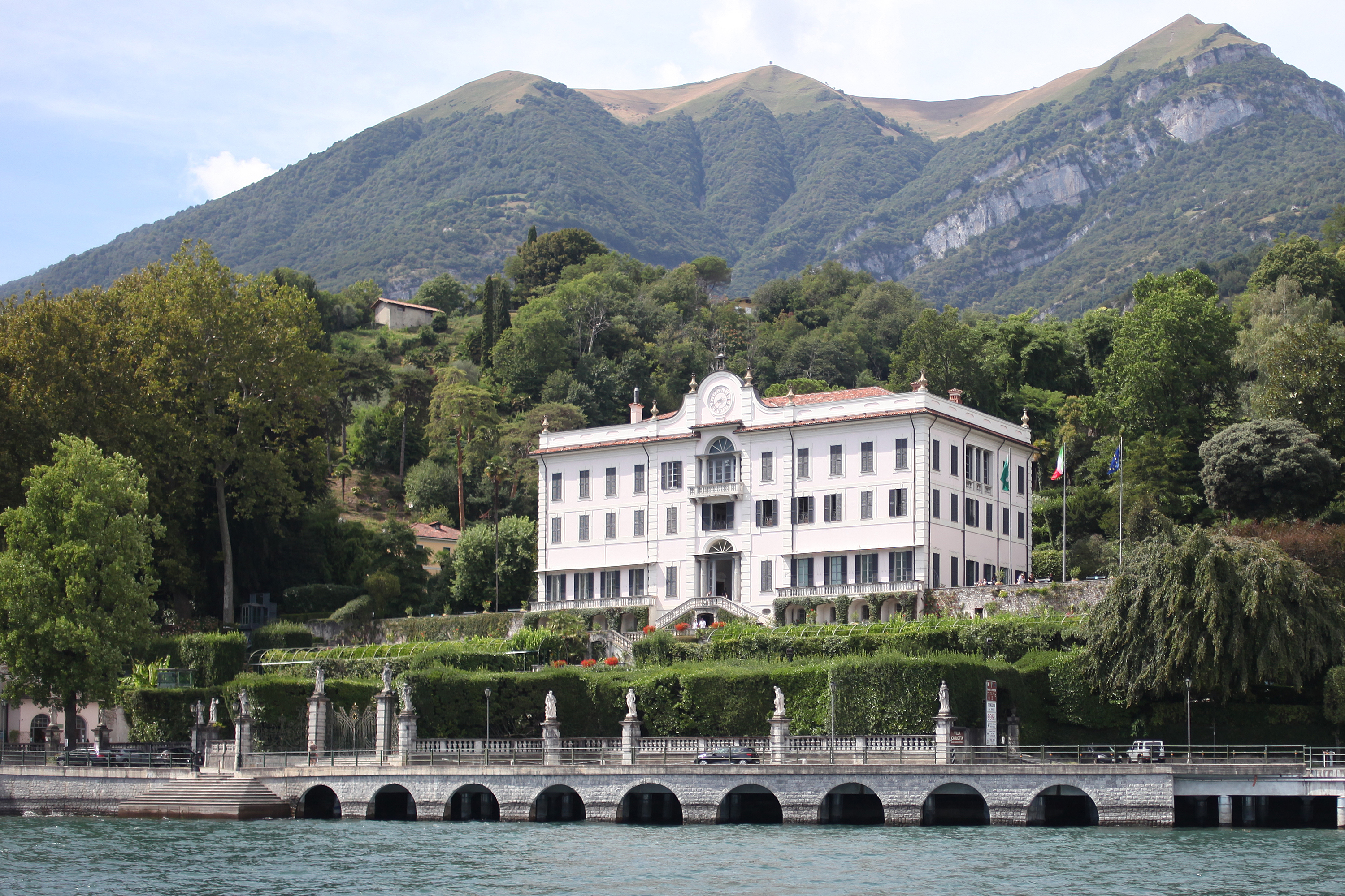 Veduta di villa Carlotta, Tremezzo, Lago di Como